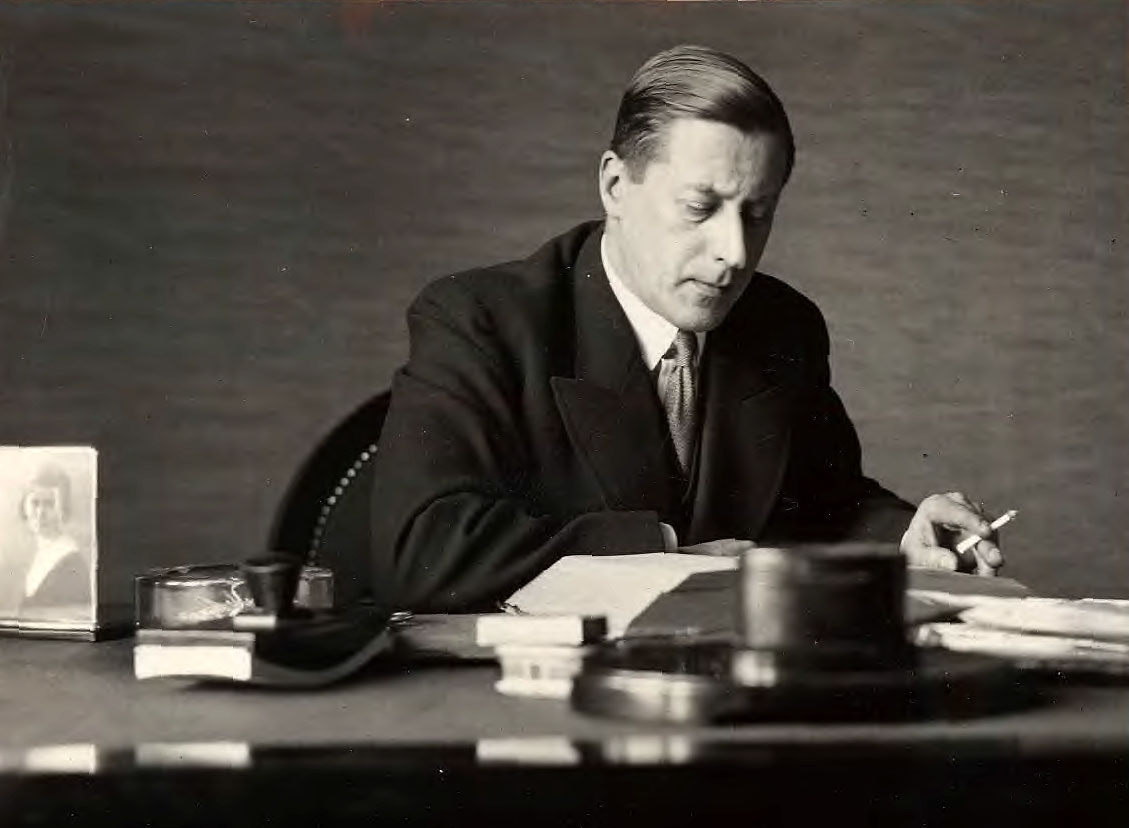 Leon Malhomme